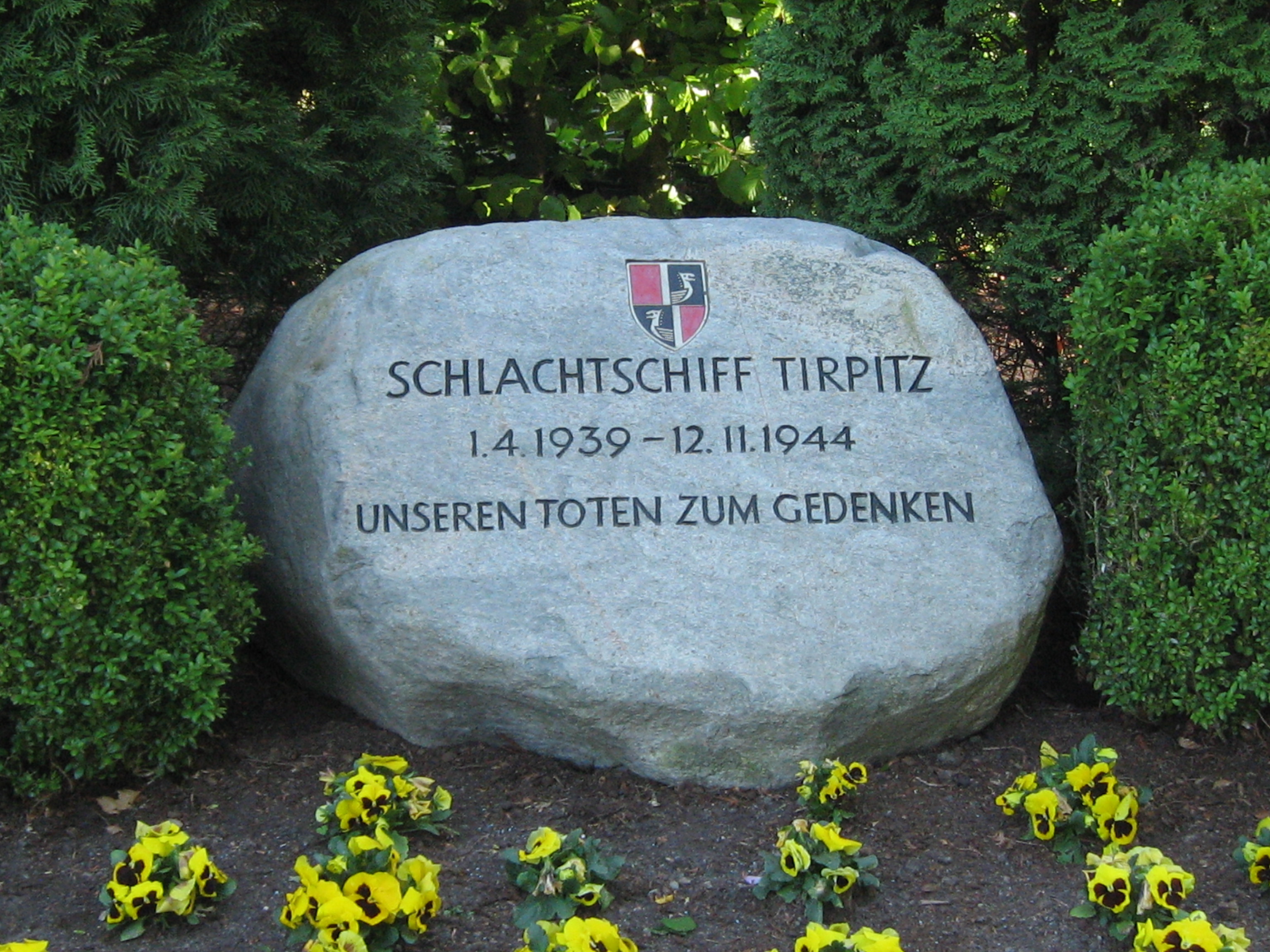 Gedenkstein für die Gefallenen des Schlachtschiffs Tirpitz auf dem Ehrenfriedhof in Wilhelmshaven. Siehe auch Kulturlandschaft Wilhelmshaven, Band 2 - Denkmäler im öffentlichen Raum, Wilhelmshaven 2017, ISBN 978-3-941929-22-7. S.116f